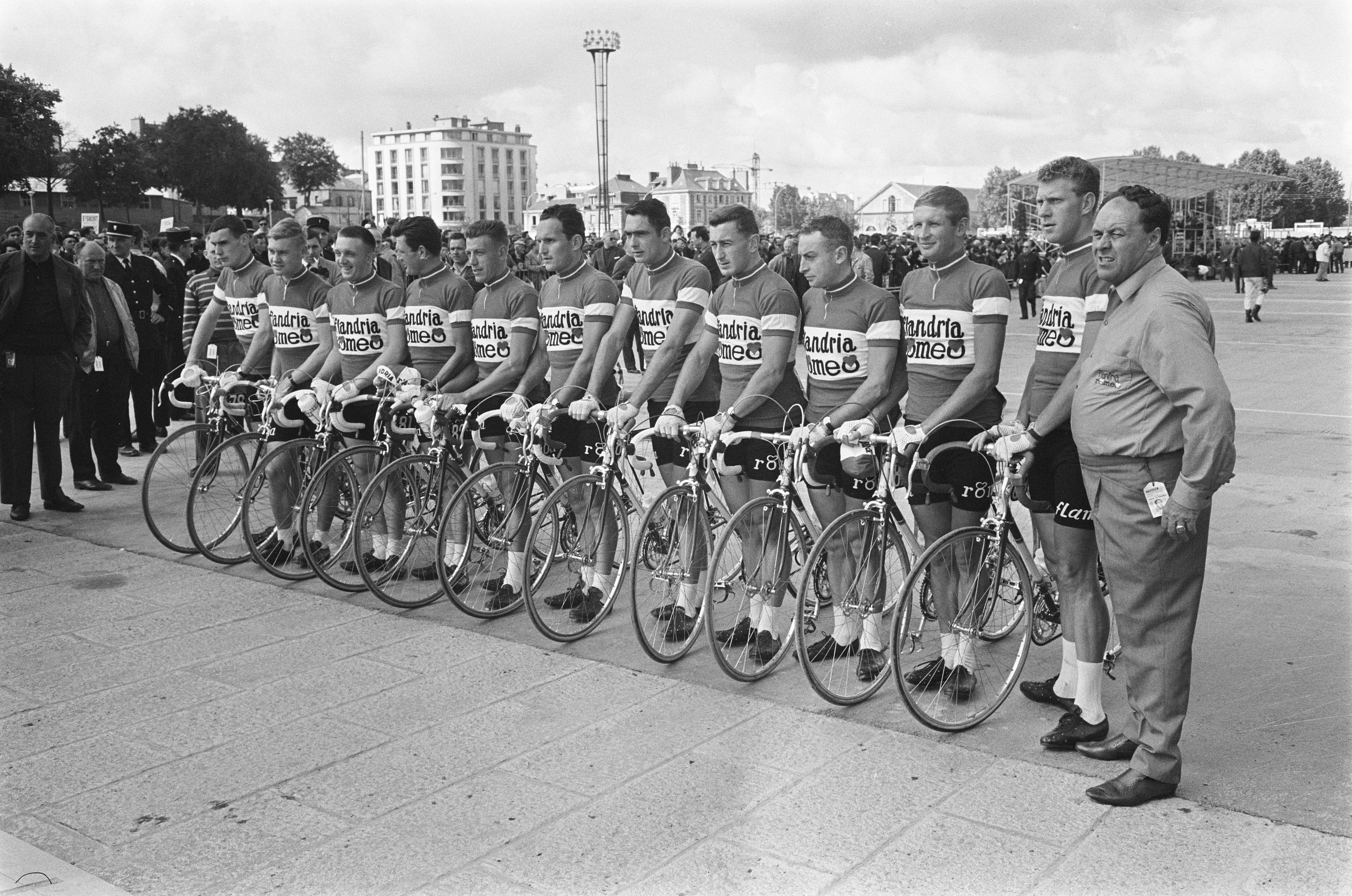 Collectie / Archief : Fotocollectie Anefo Reportage / Serie : Tour de France 1964 Beschrijving : 51ste Tour de France 1964, Flandriaploeg met Huub Zilverberg (geheel rechts) Datum : 22 juni 1964 Locatie : Frankrijk, Rennes Trefwoorden : groepsportretten, sport, wielrennen Persoonsnaam : Zilverberg, Huub Instellingsnaam : Tour de France Fotograaf : Harry Pot / Anefo, [onbekend] Auteursrechthebbende : Nationaal Archief Materiaalsoort : Negatief (zwart/wit) Nummer archiefinventaris : bekijk toegang 2.24.01.05 Bestanddeelnummer : 916-5788